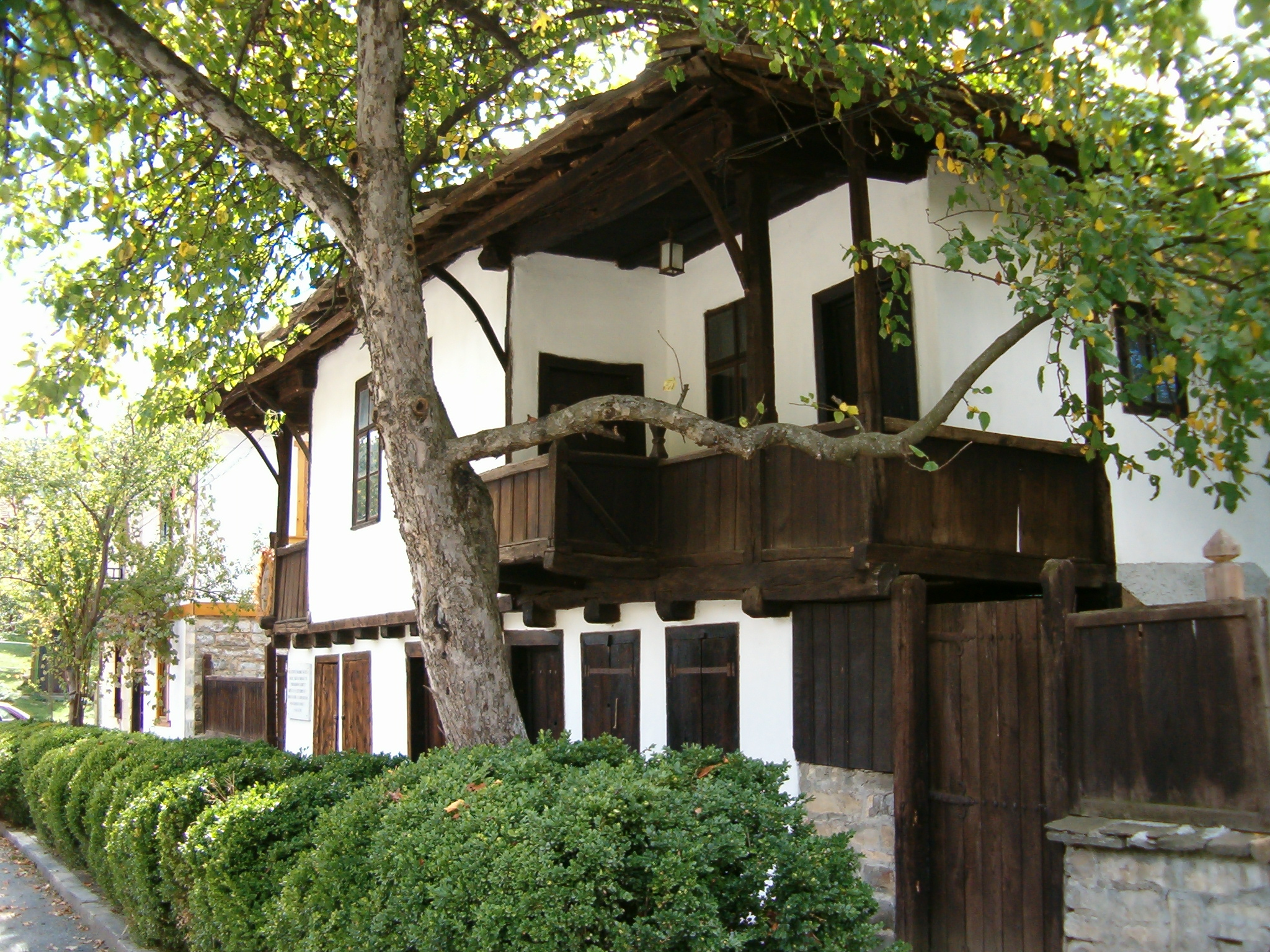 Къща-музей с. Голям Извор